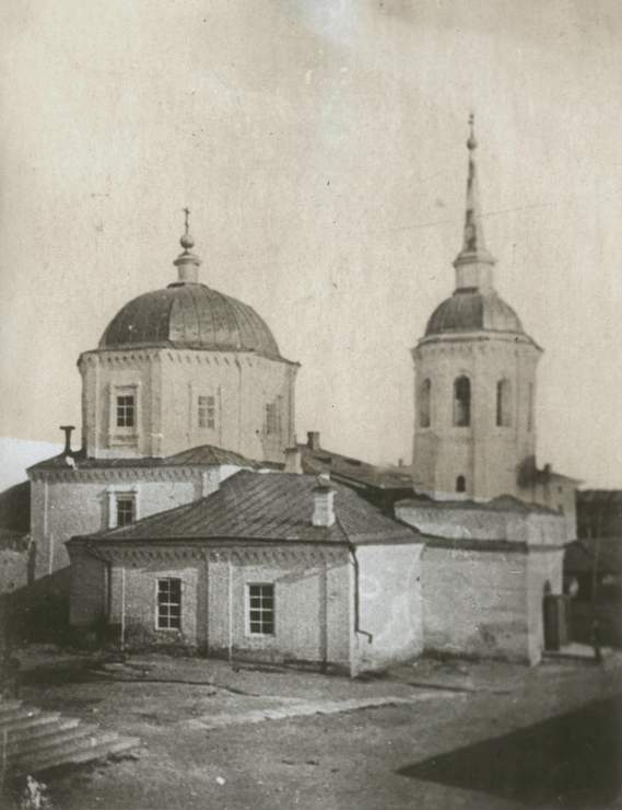 Спасо-Преображенский собор Самары